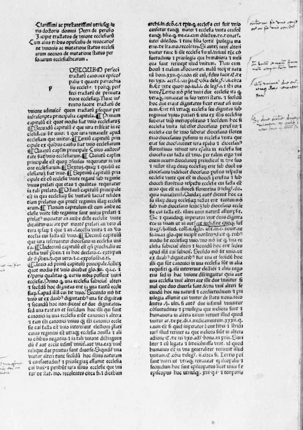 Frontespizio